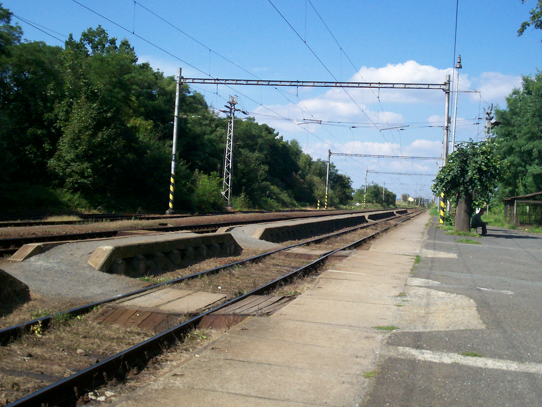 Kolejiště blovického nádraží. Pohled směr Plzeň.